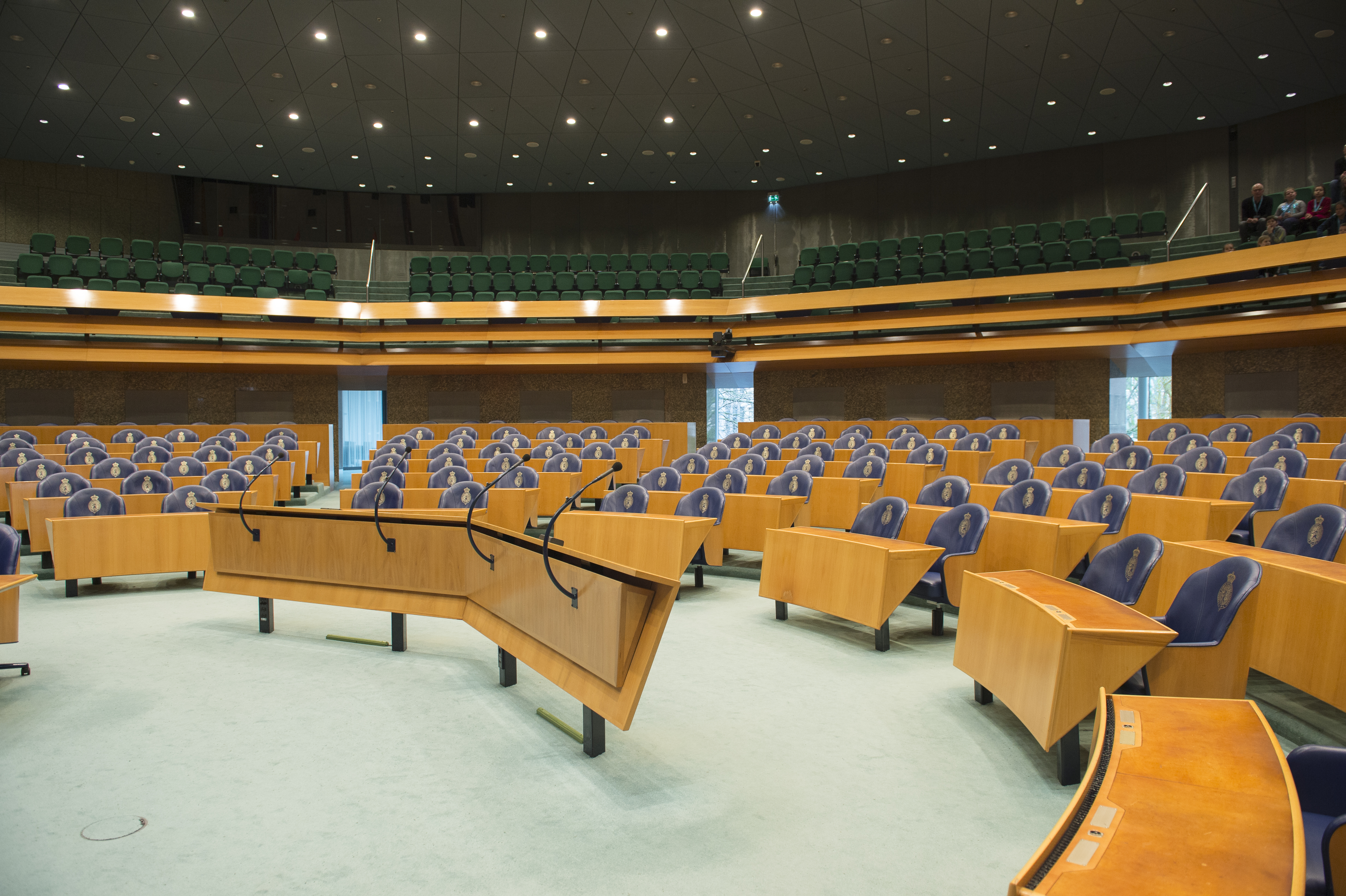 Parlamento Holandés, La Haya, Holanda